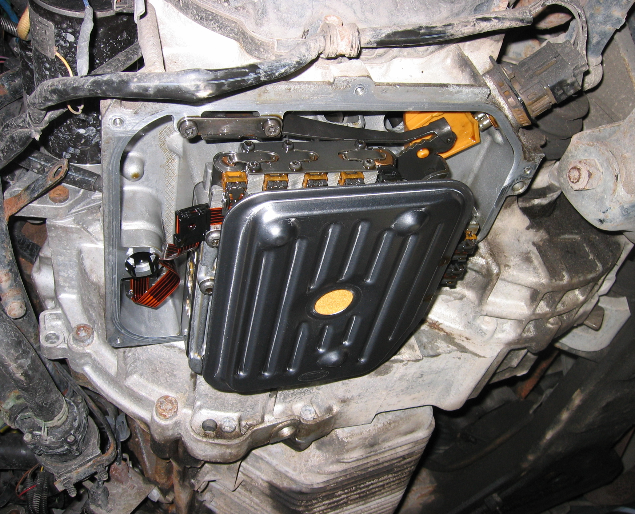 Installiert Ölfilter in einem geöffleten Automatikgetriebe mit abgenommener Ölwanne